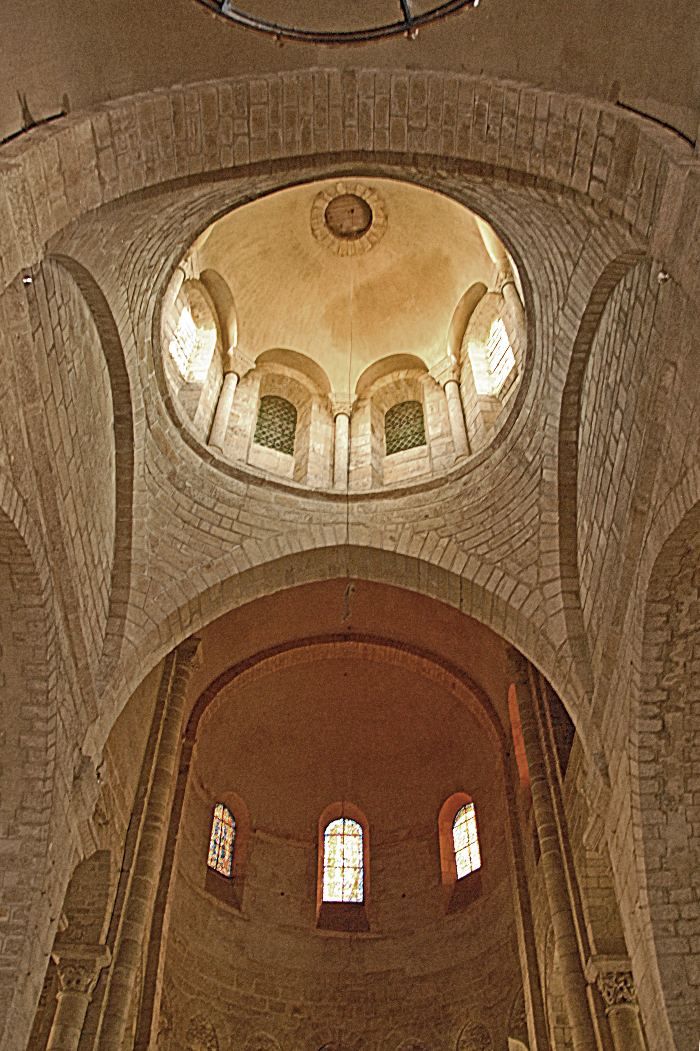 Stiftskirche St.-Léonard-de-Noblat, Vierung u. Chor aus Joch 5